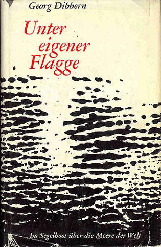 Dibbern Quest German